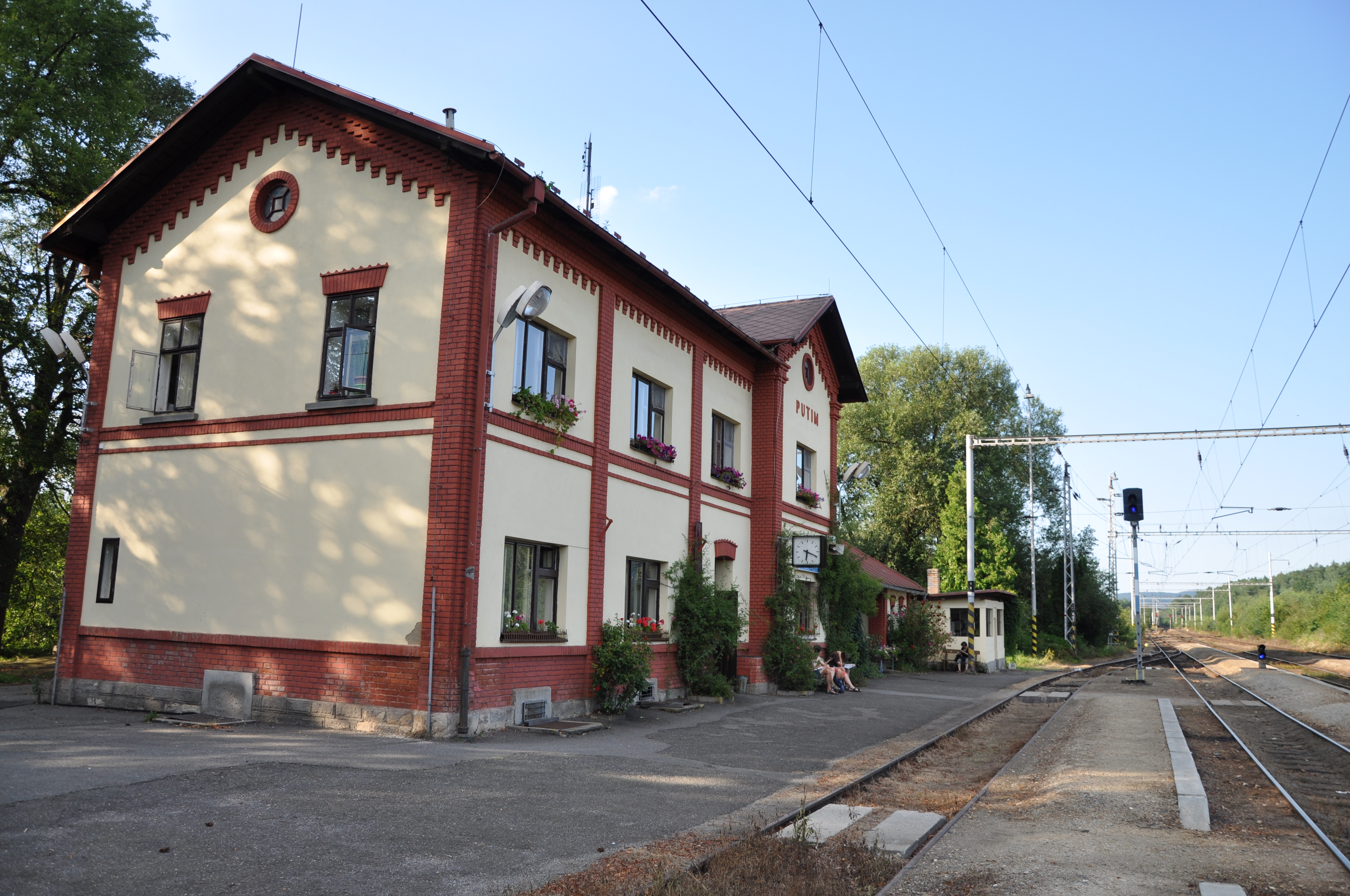 Nádraží. Putim. Okres Písek. Česká republika.